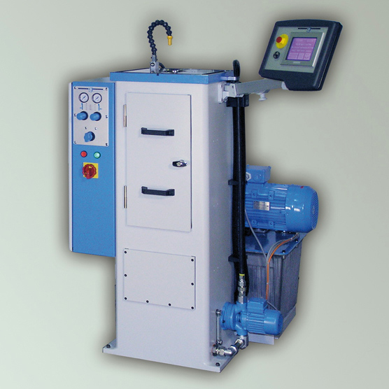 Nutenziehmaschine